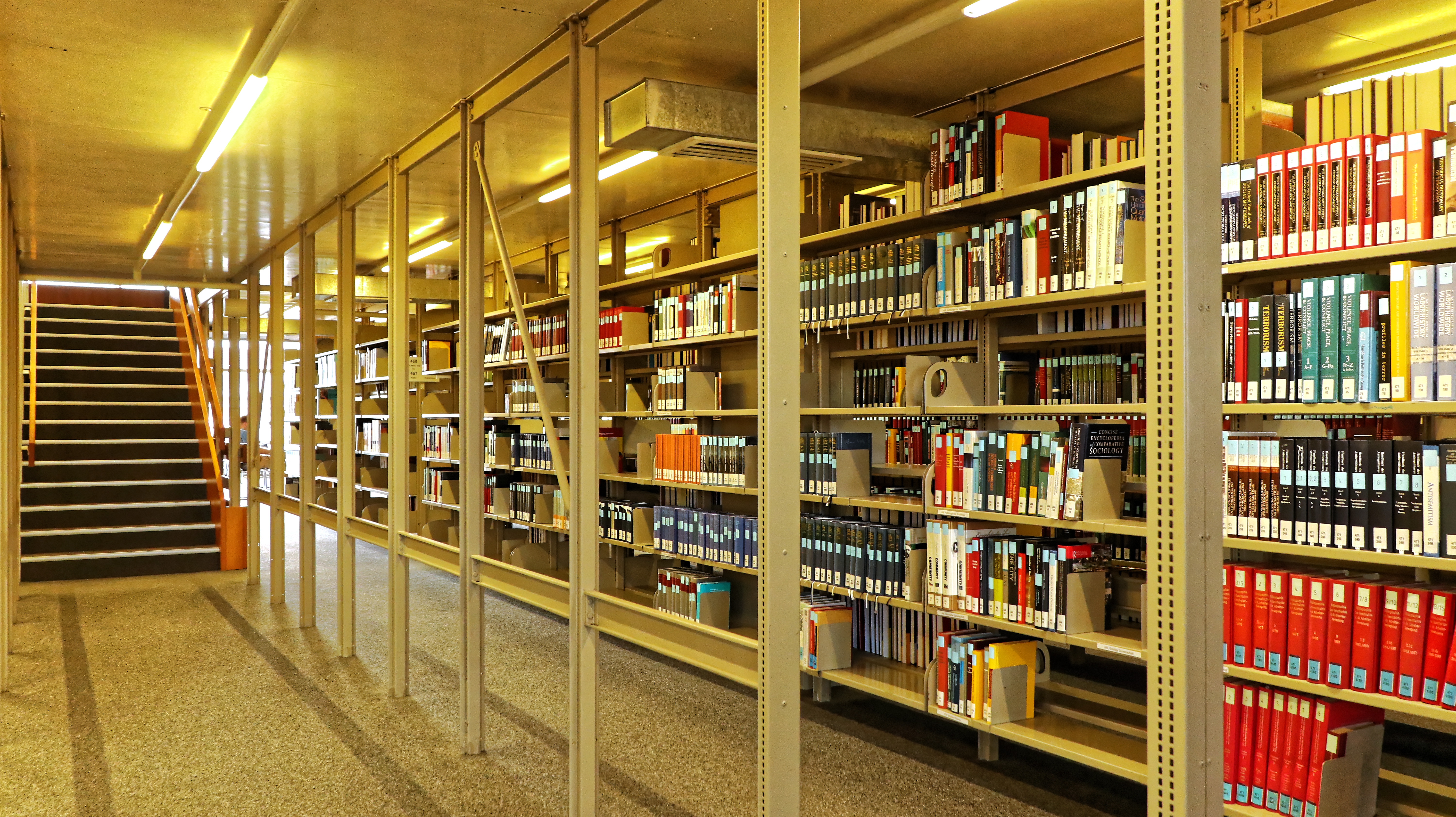 Bücherregale im Abholbereich der Bayerischen Staatsbibliothek im Bereich der Lesesäle